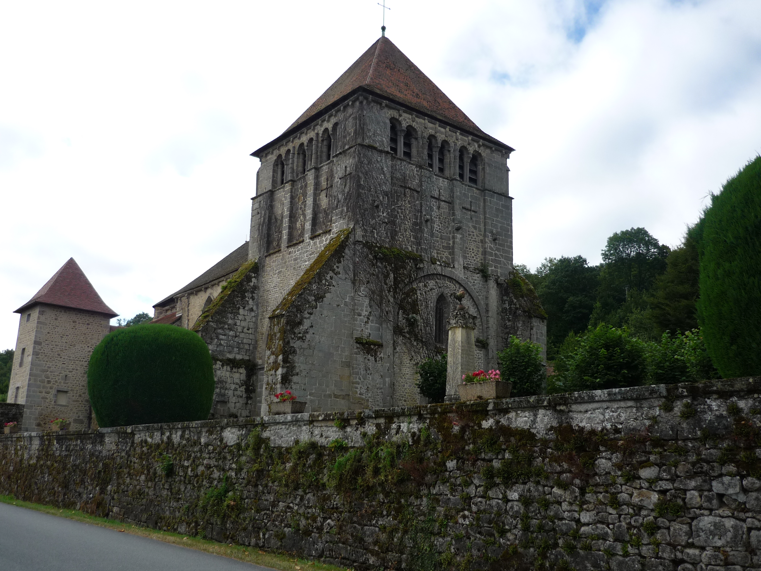 Abbaye de Moutier-d'Ahun, dans la Creuse .